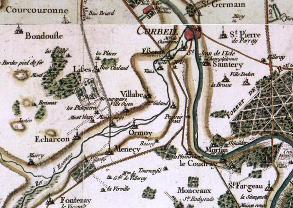 Carte de la région de Villabé (91) au XVIIe siècle par Cassini